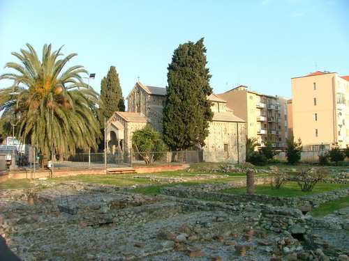 Foto di mia proprietà, concessa a Wikipedia con licenza GFDL